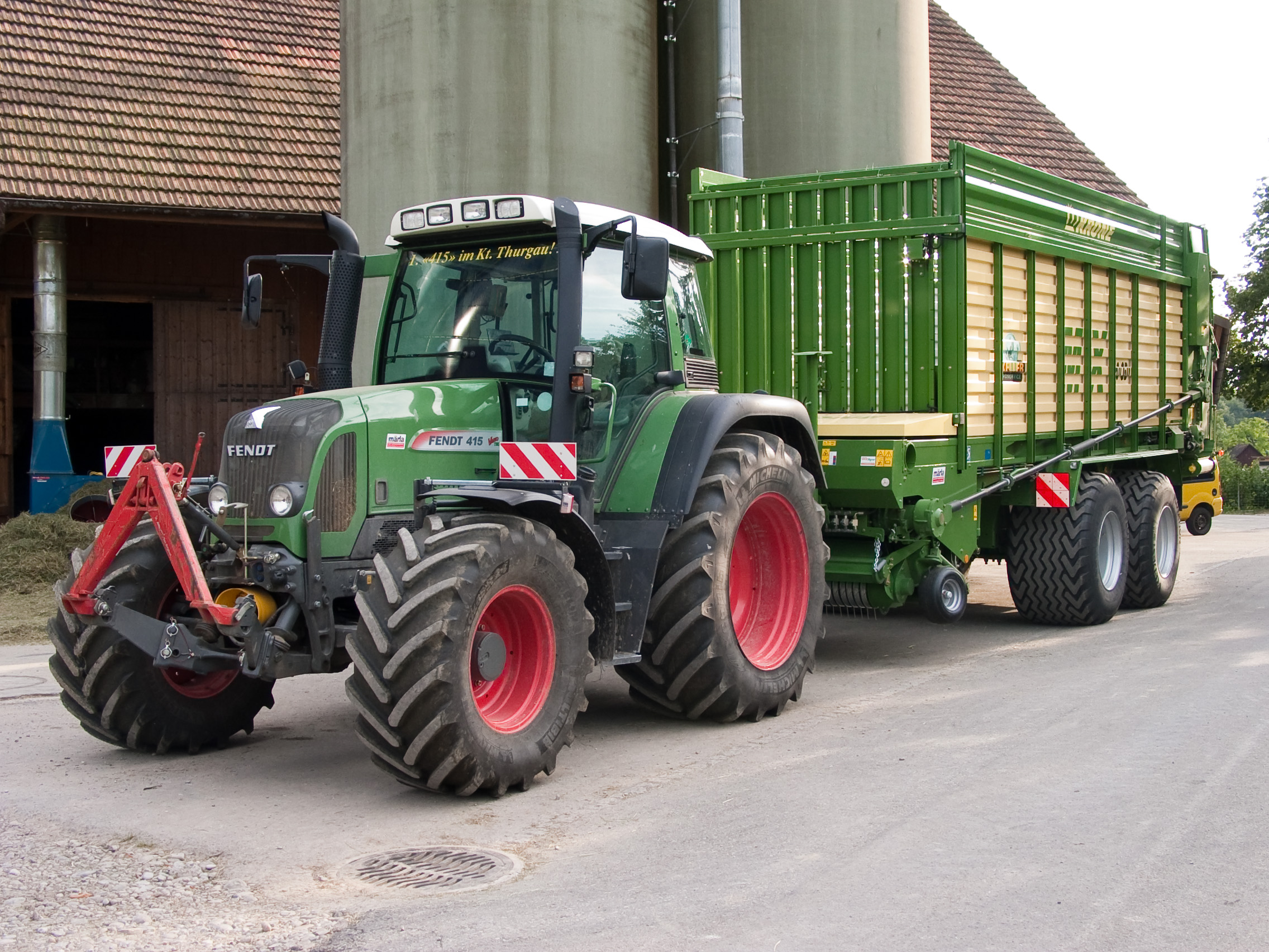 Fendt 415 Vario mit Krone Ladewagen in Weinfelden